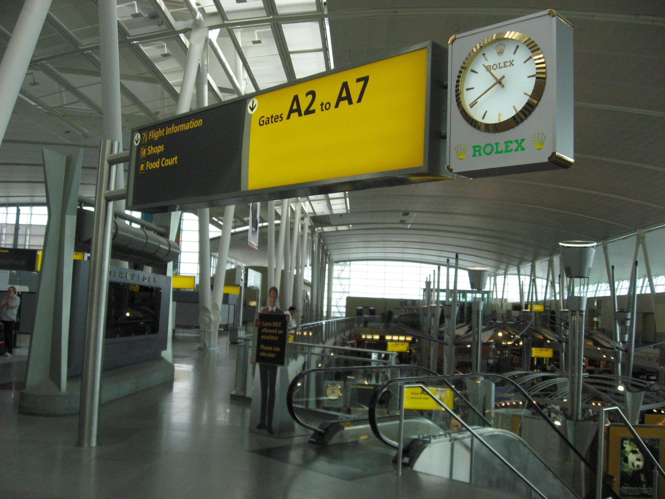 Aeropuerto JFK (New York) donde se aprecian los elementos de señalización diseñados por Paul Mijksenaar